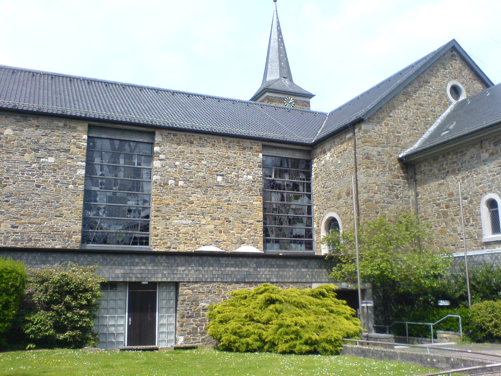 Pfarrkirche St. Rochus in Zweifall (Ansicht des neuen Teils)